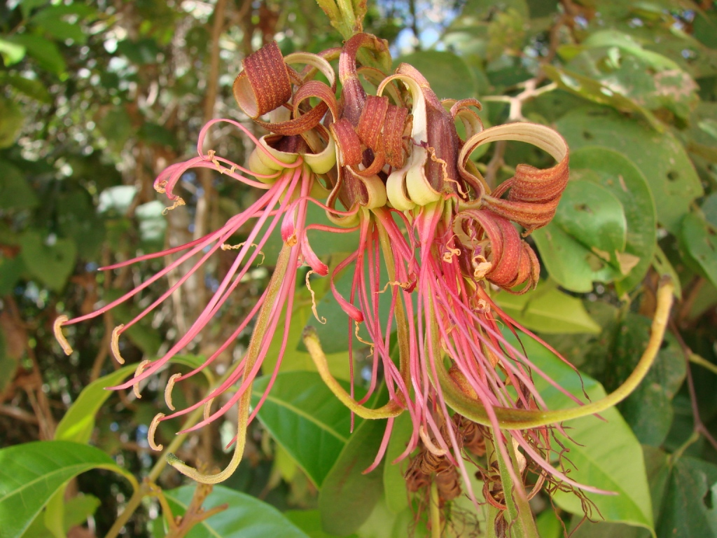 Bauhinia ungulata - FABACEAE - Parque Nacional de Brasília - Distrito Federal - Brasil.